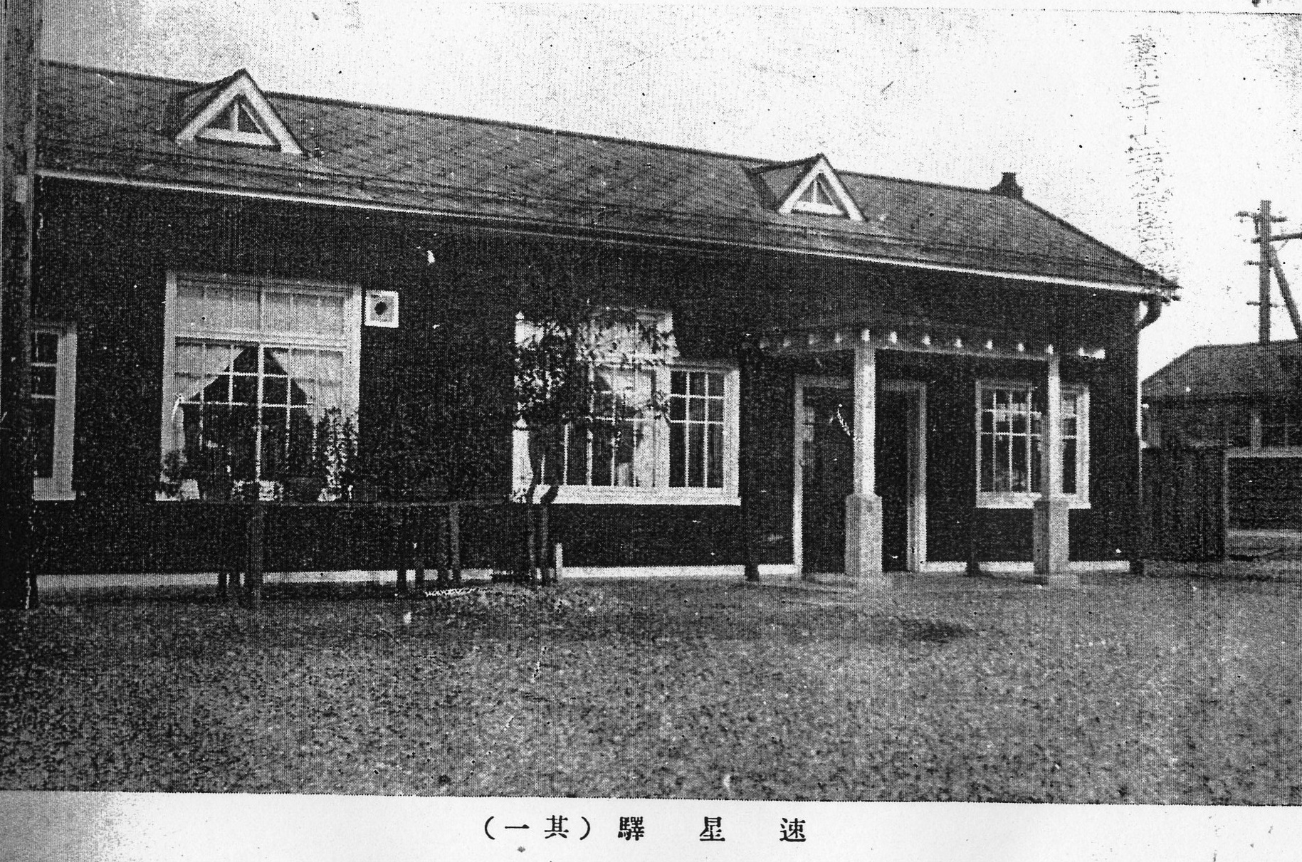 飛越線速星駅駅舎